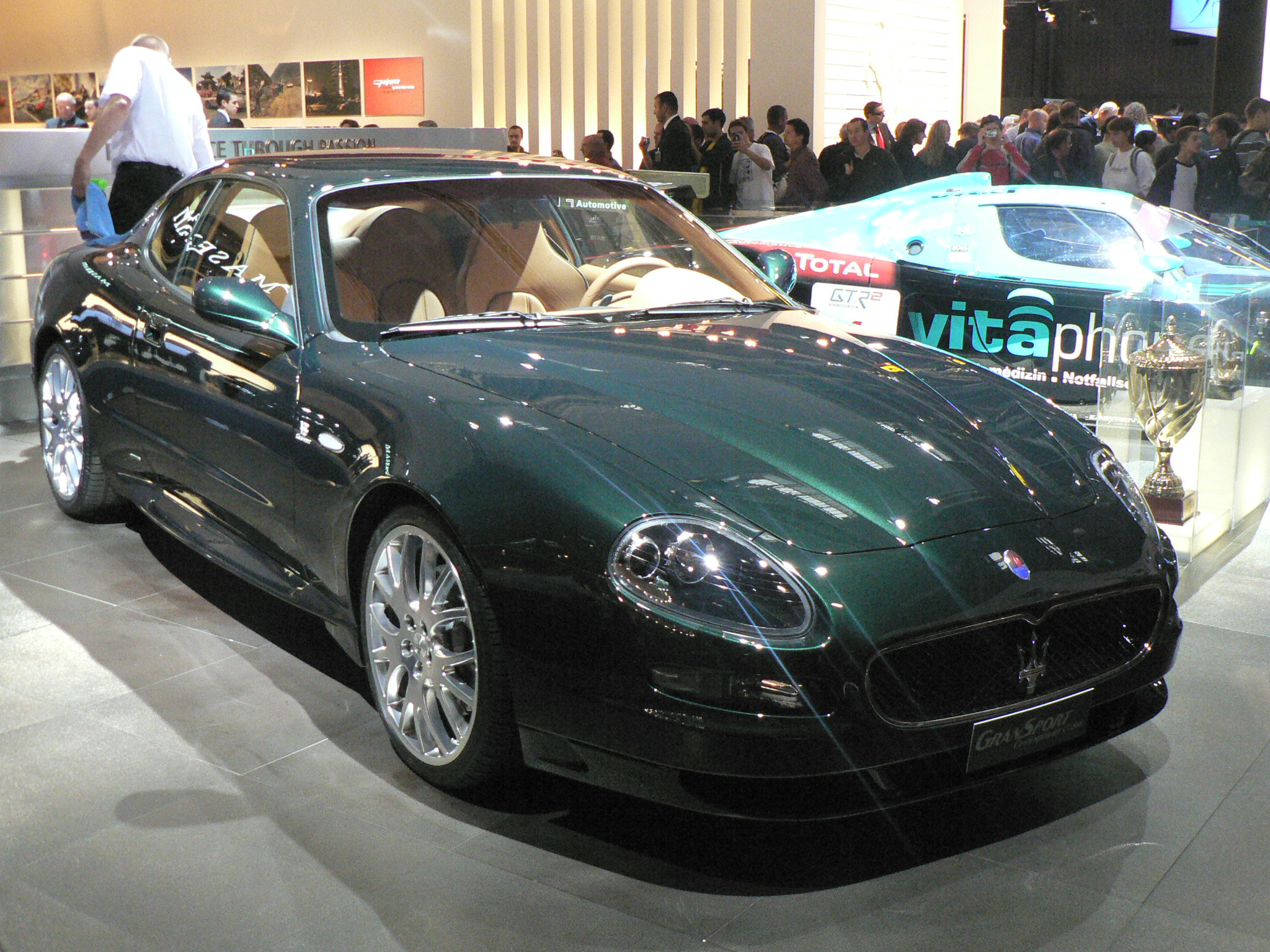 Mondial de l'automobile, Paris 2006